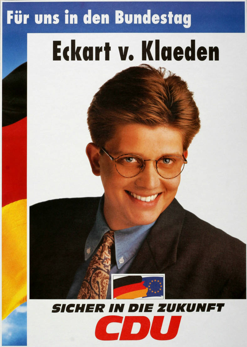 Für uns in den Bundestag Eckart v. Klaeden Sicher in die Zukunft CDU Abbildung: Porträtfoto - Nationalfarben Plakatart: Kandidaten-/Personenplakat mit Porträt Objekt-Signatur: 10-001: 4022 Bestand: Plakate zu Bundestagswahlen (10-001) GliederungBestand10-18: Plakate zu Bundestagswahlen (10-001) » Die 13. Bundestagswahl am 16. Oktober 1994 » CDU » Mit Porträtfoto Lizenz: KAS/ACDP 10-001: 4022 CC-BY-SA 3.0 DE